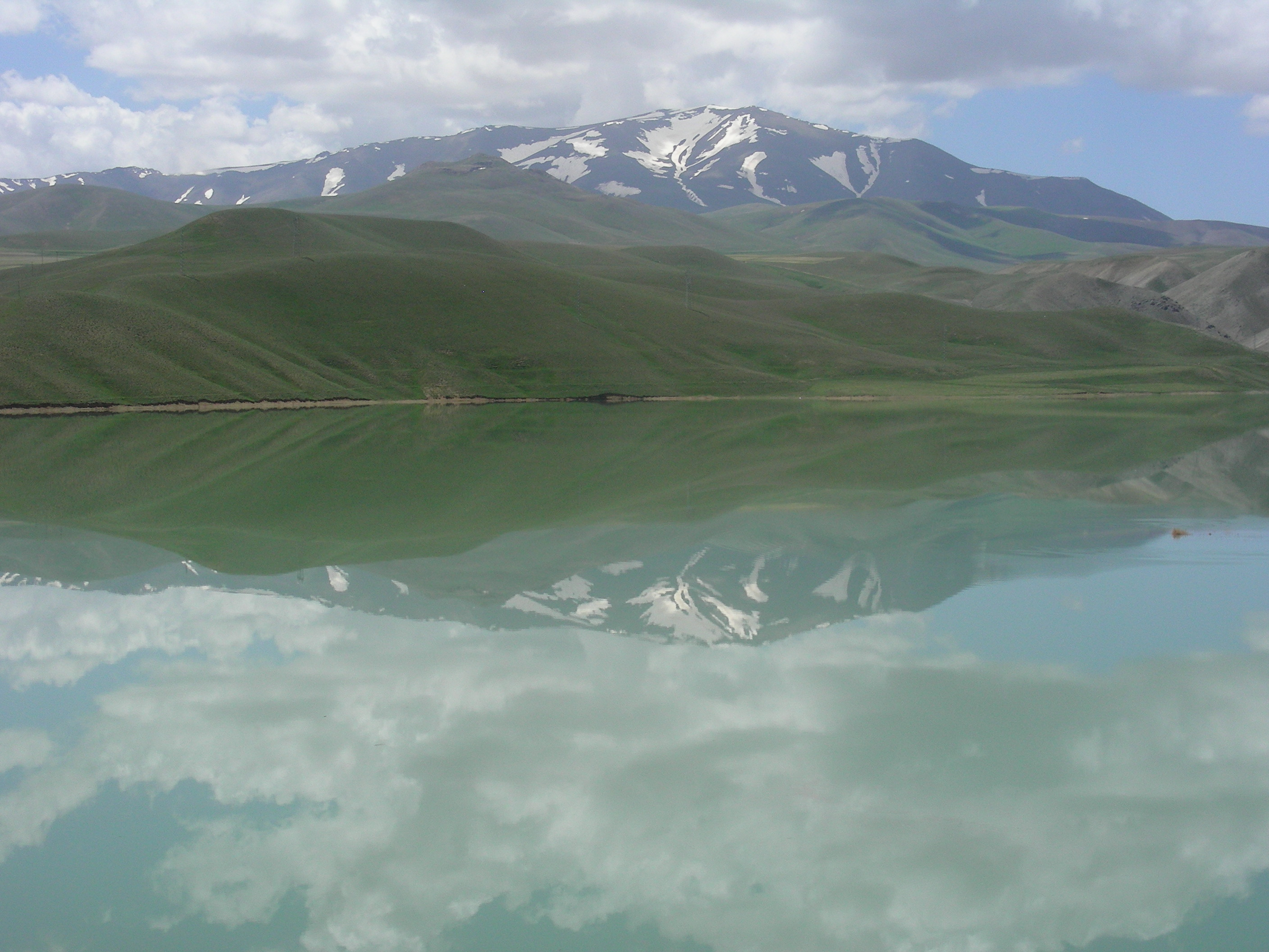 Zernek Baraji